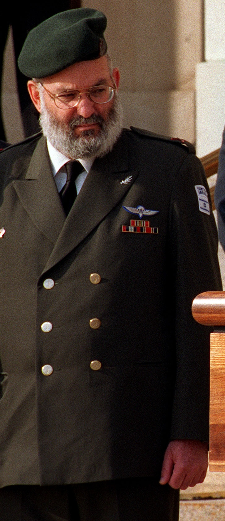 Yaacov Amidror